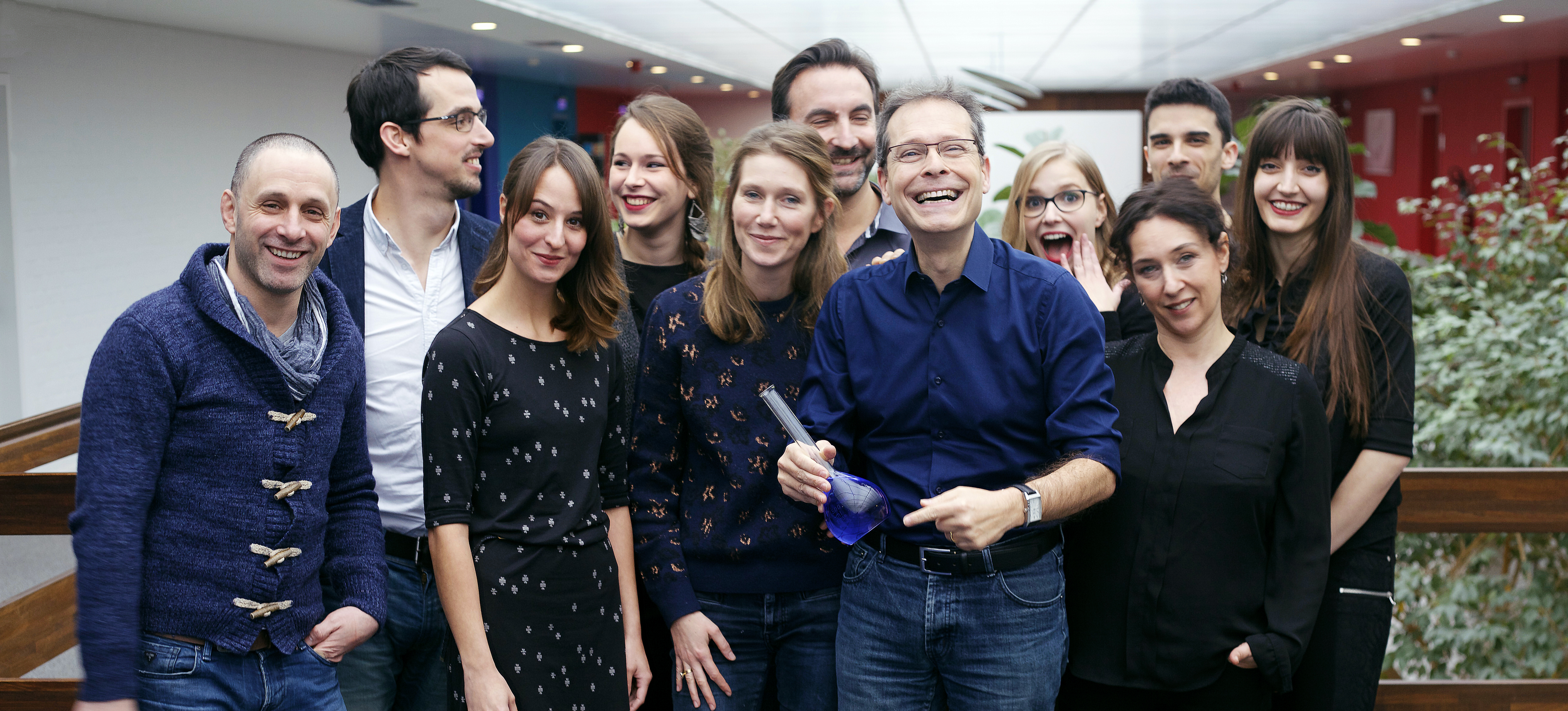 L'équipe de Matière Grise - RTBF